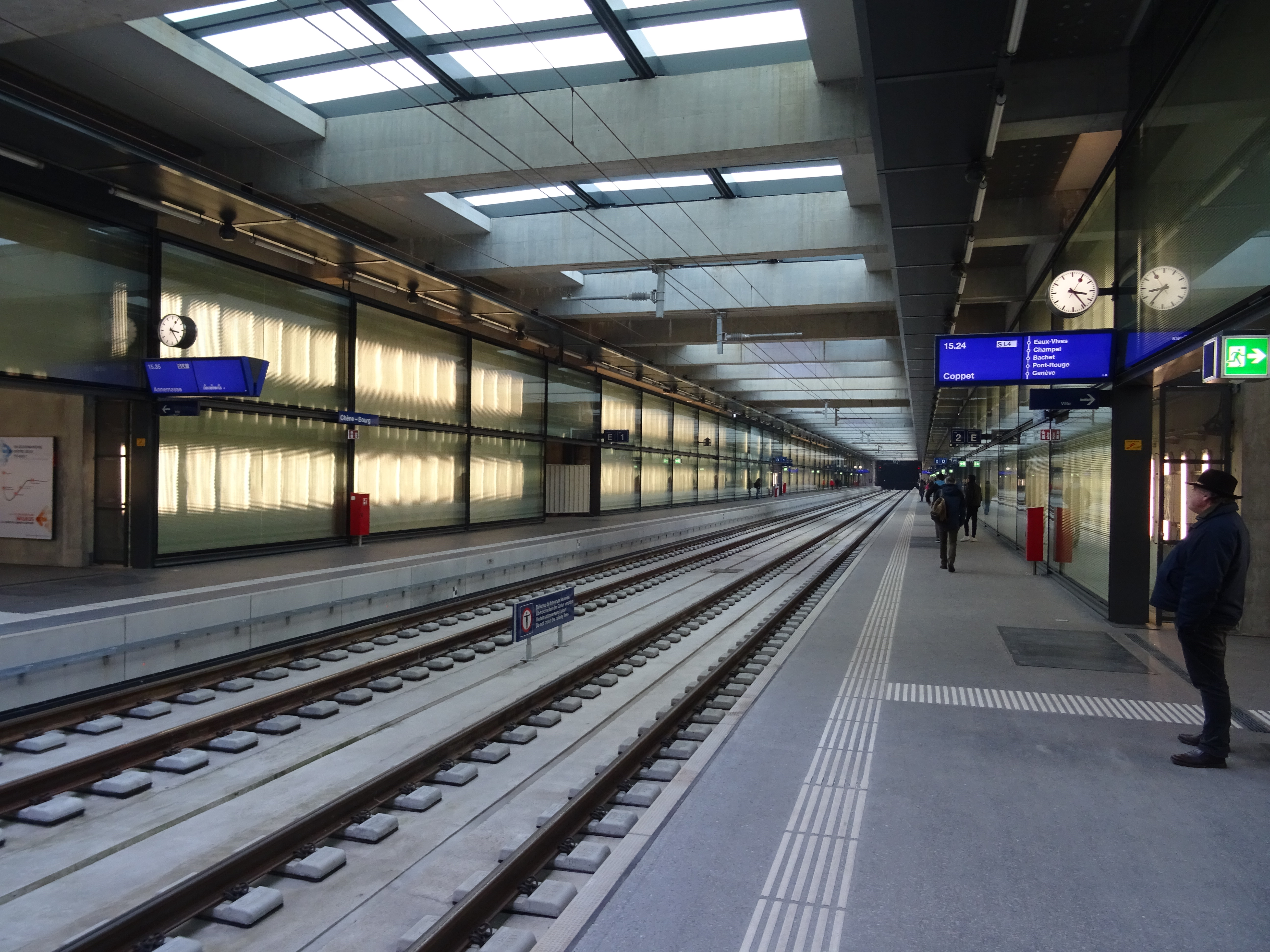 Voies de la gare de Chêne-Bourg vues en direction de Coppet.